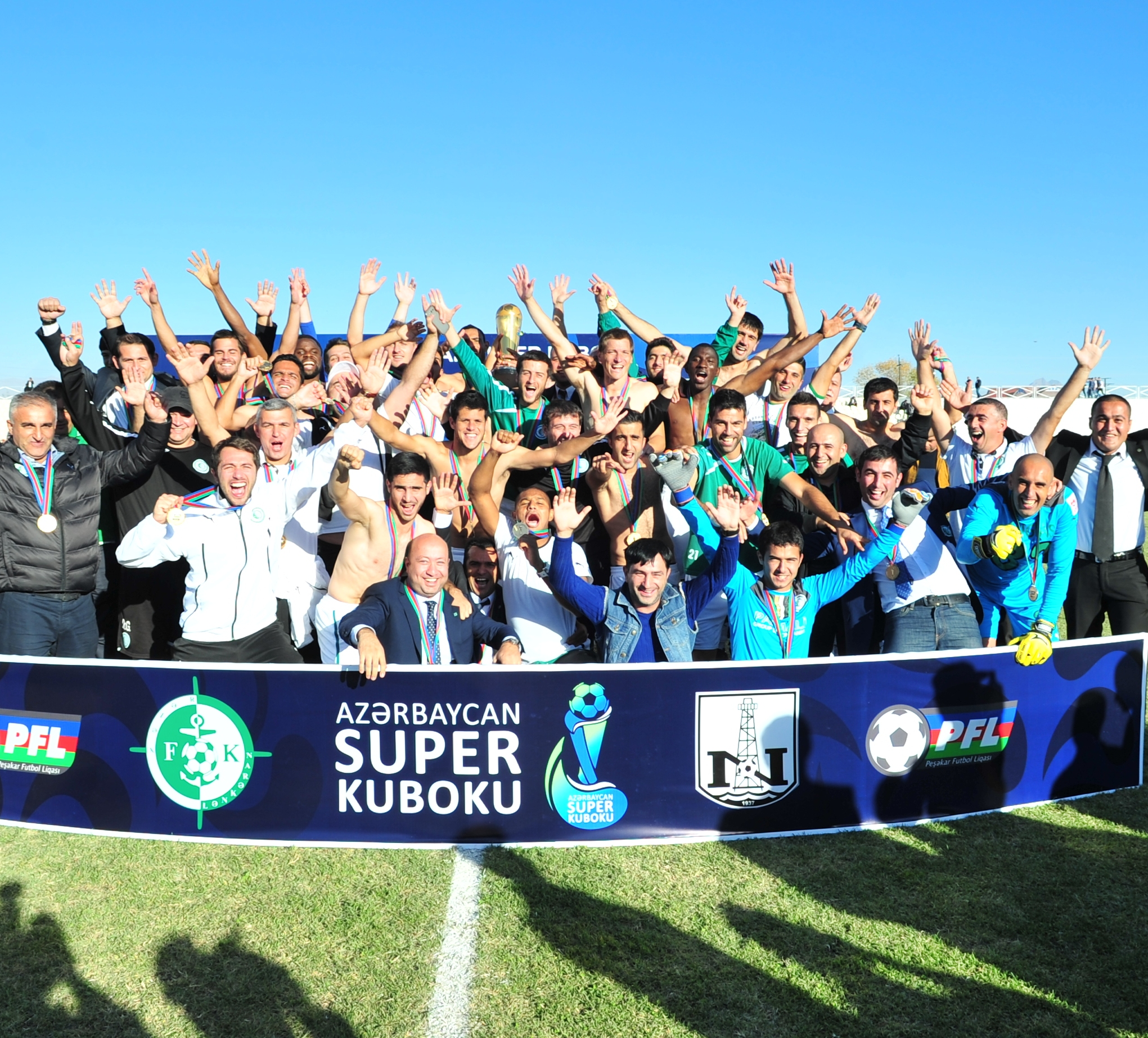 23 oktyabr 2013-cü il. Azərbaycan Superkubokunun qalibi "Xəzər Lənkəran" oldu.